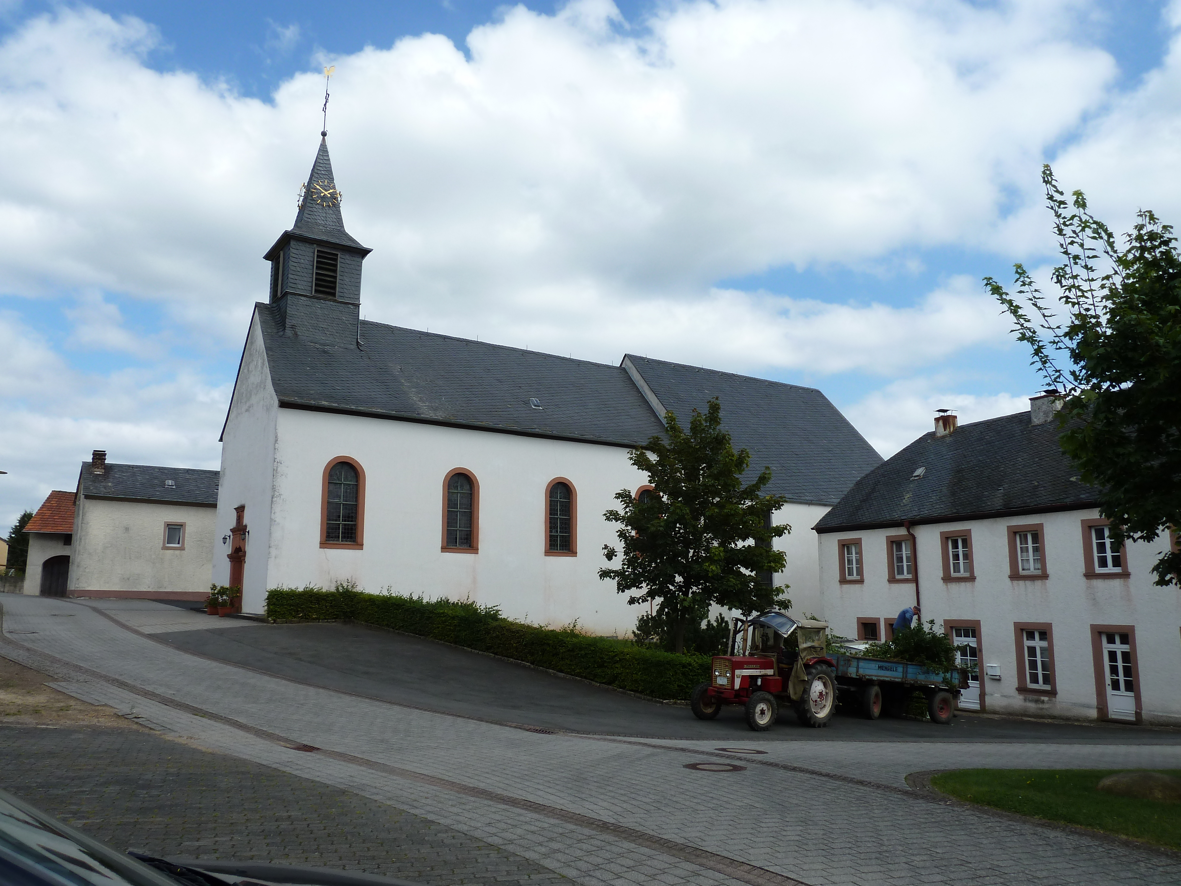 De parochie kerk in Gindorf